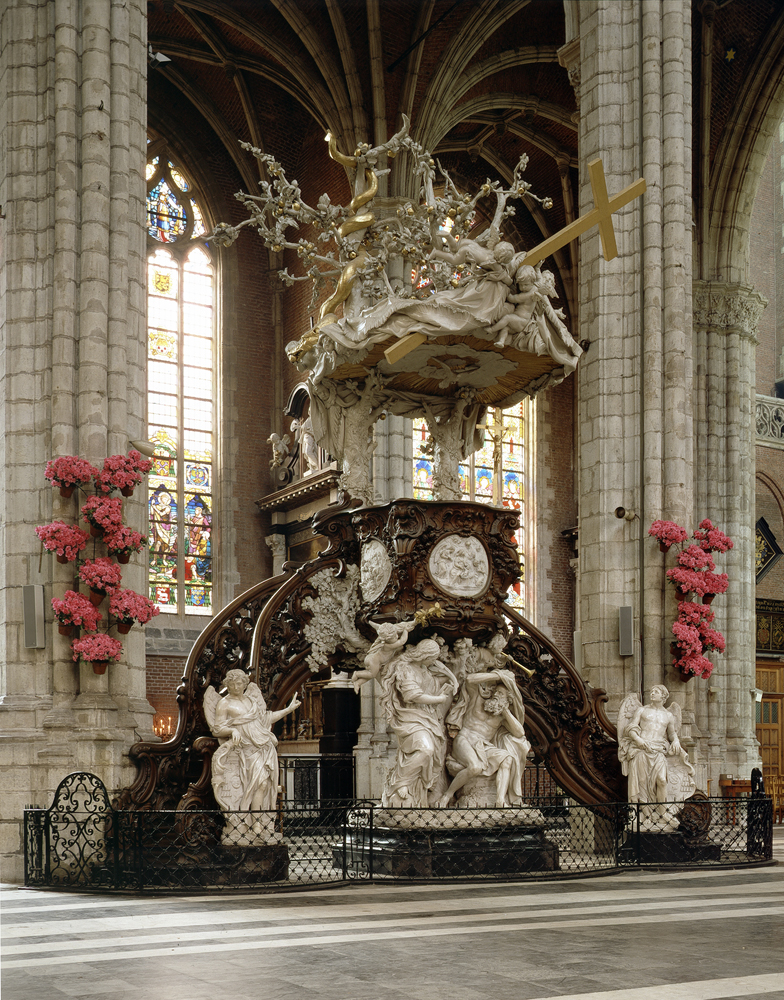 Sint-Baafskathedraal, Gent Laurent Delvaux, Preekstoel, 1741-1745; inv: 122